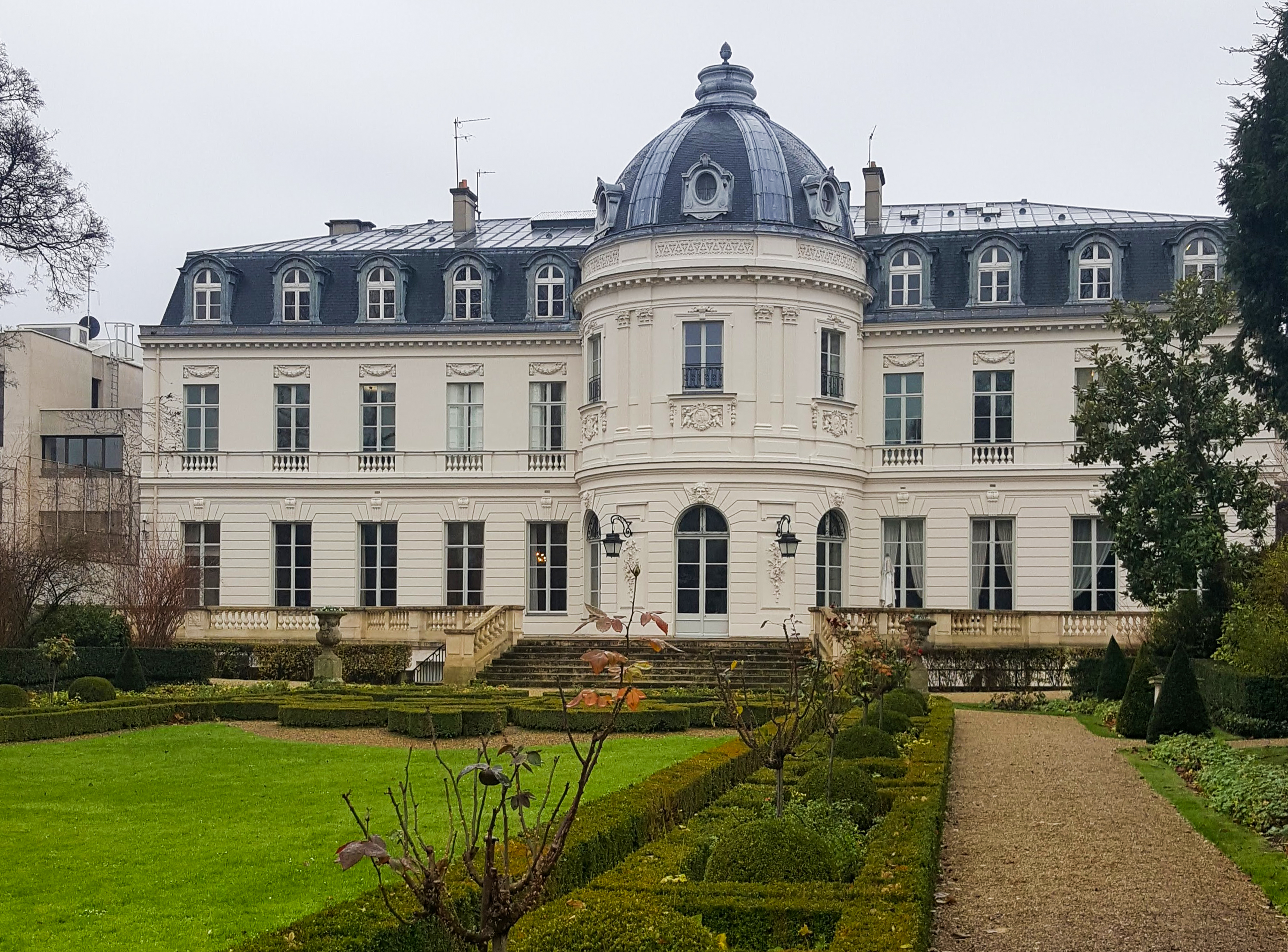 Hôtel de Cassini 2017